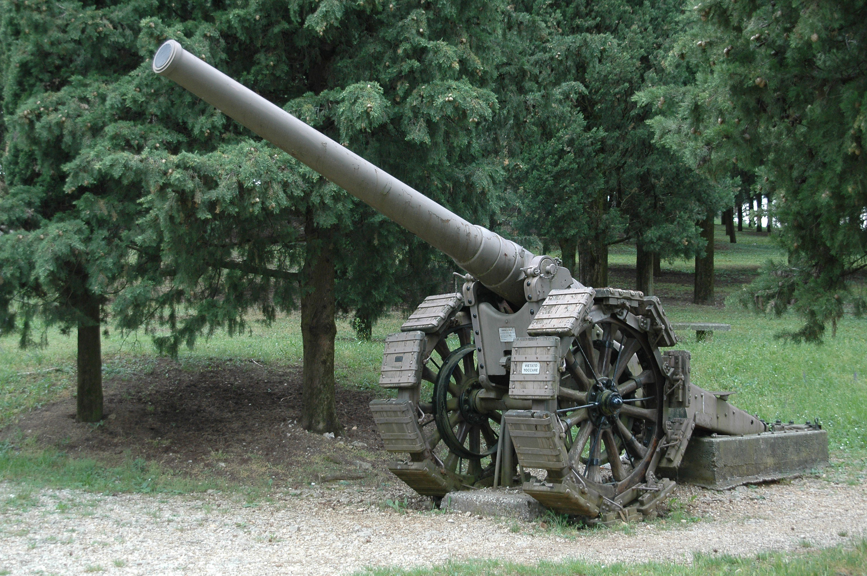 Geschütz im Gedenkpark von Redipuglia